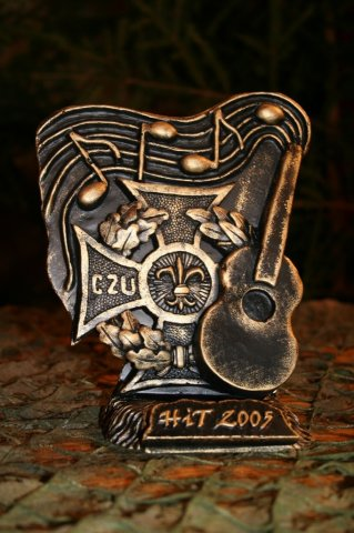 Statuetka Festiwalu Piosenki Harcerskiej i Turystycznej HiT